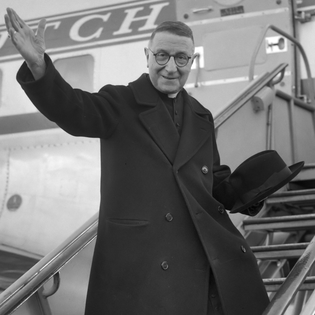 Vertrek van kardinaal Giobbe per KLM naar Rome groet op de vliegtuigtrap 6 december 1958